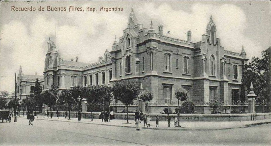 Vista del edificio de la Escuela Normal de Profesoras en Buenos Aires (actualmente Escuela Normal 1 "Roque Sáenz Peña), construido en 1880 en la Avenida Córdoba, entre las calles Ayacucho y Riobamba.